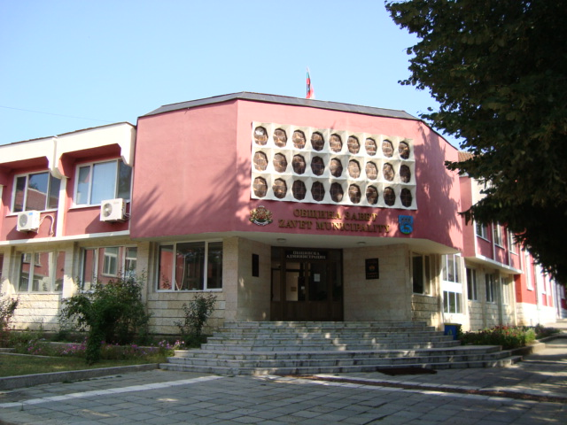 Община завет